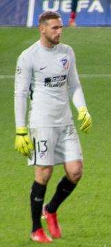 Jan Oblak playing for Atletico Madrid